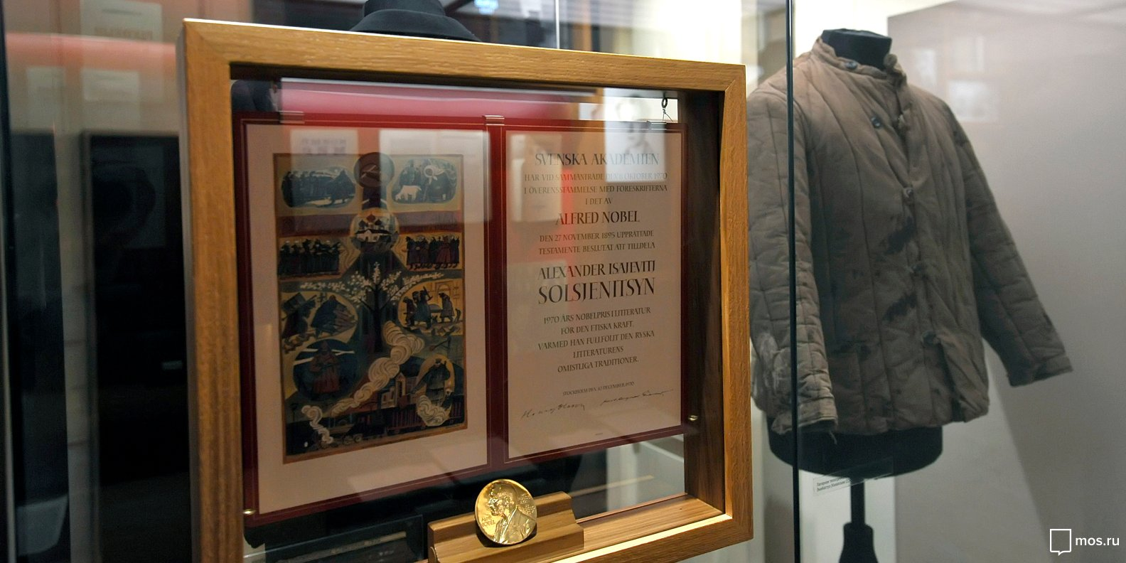 Мемориальная квартира Александра Солженицына в составе Дома русского зарубежья